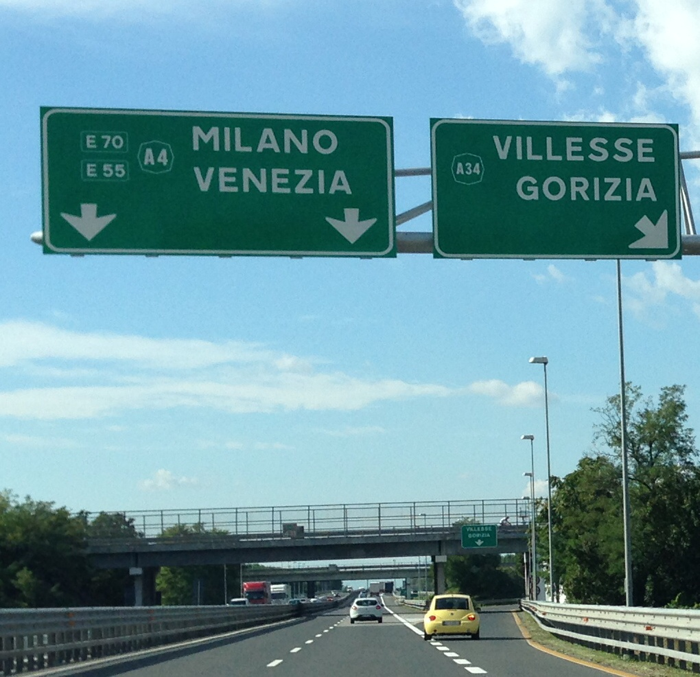 L'uscita per l'A34 (ex RA17) per Gorizia in A4 direzione Venezia-Milano